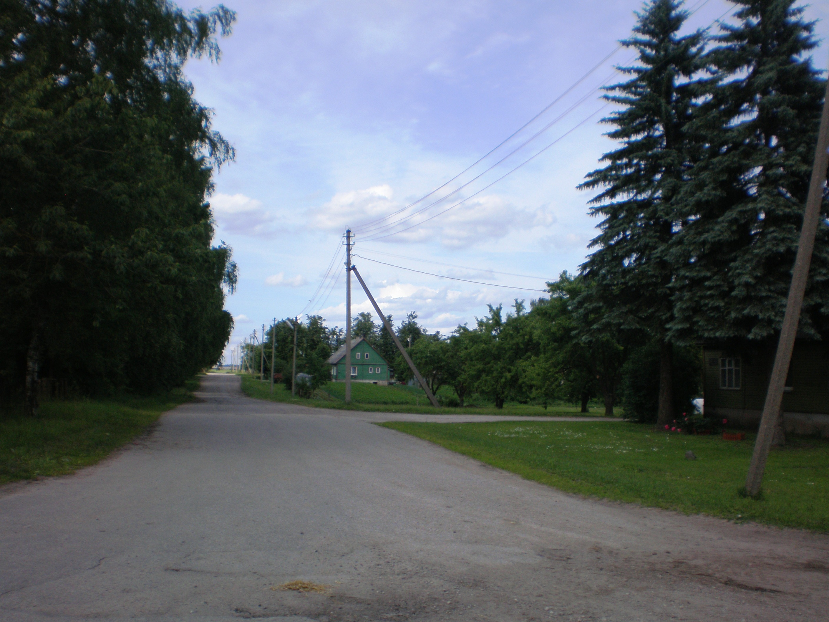 Beržai, Dotnuvos sen., Kėdainių raj.